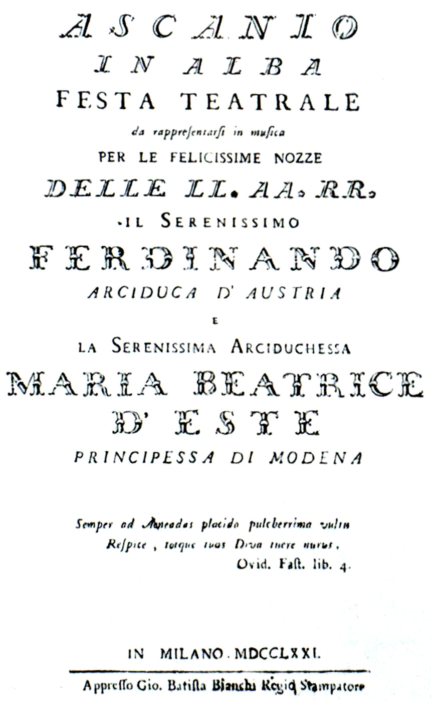 Mozart Ascanio in Alba 1771